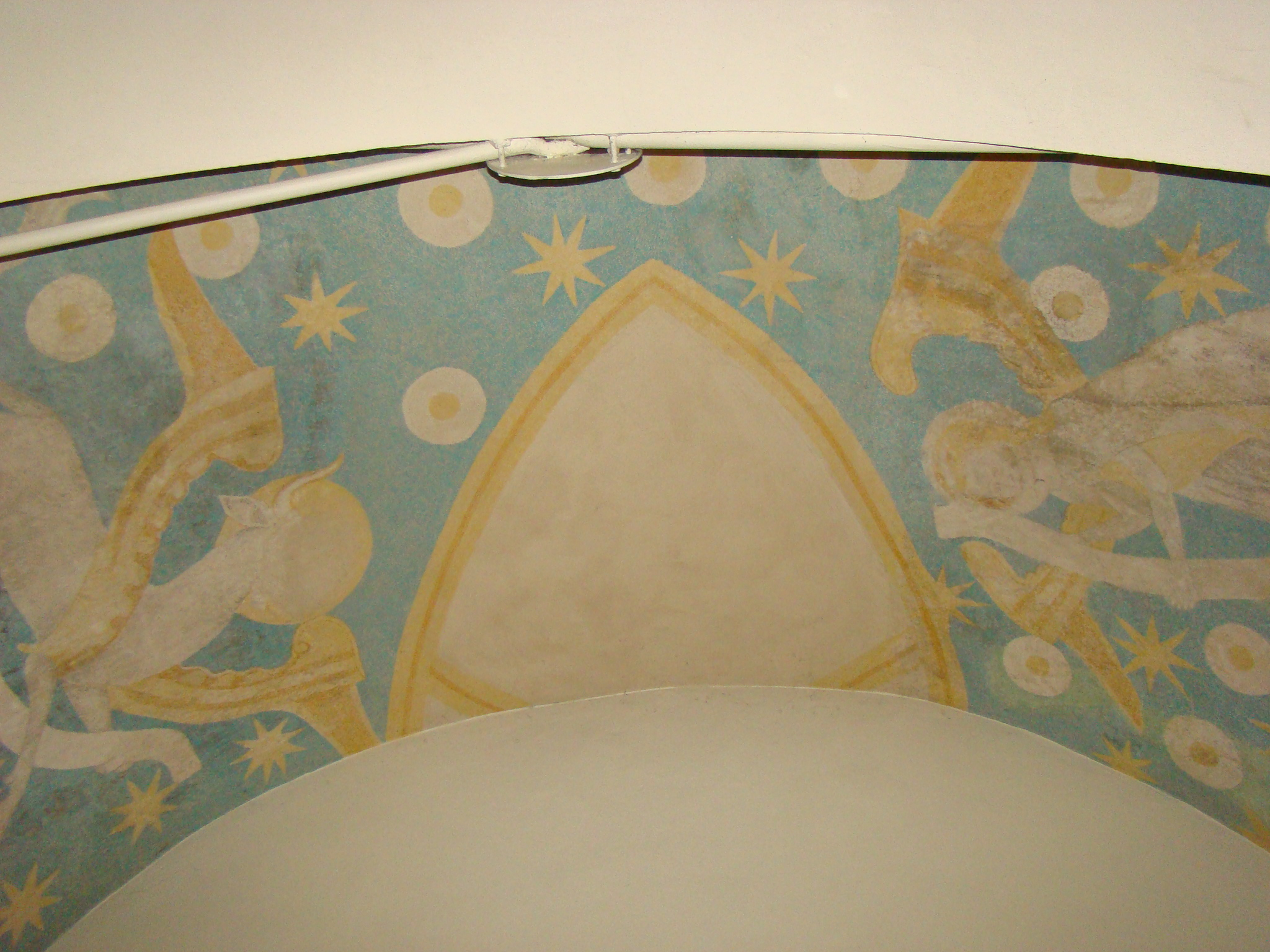 Johanneskirche in Untergruppenbach, Reste von Fresken. Foto: Peter Schmelzle (November 2011).